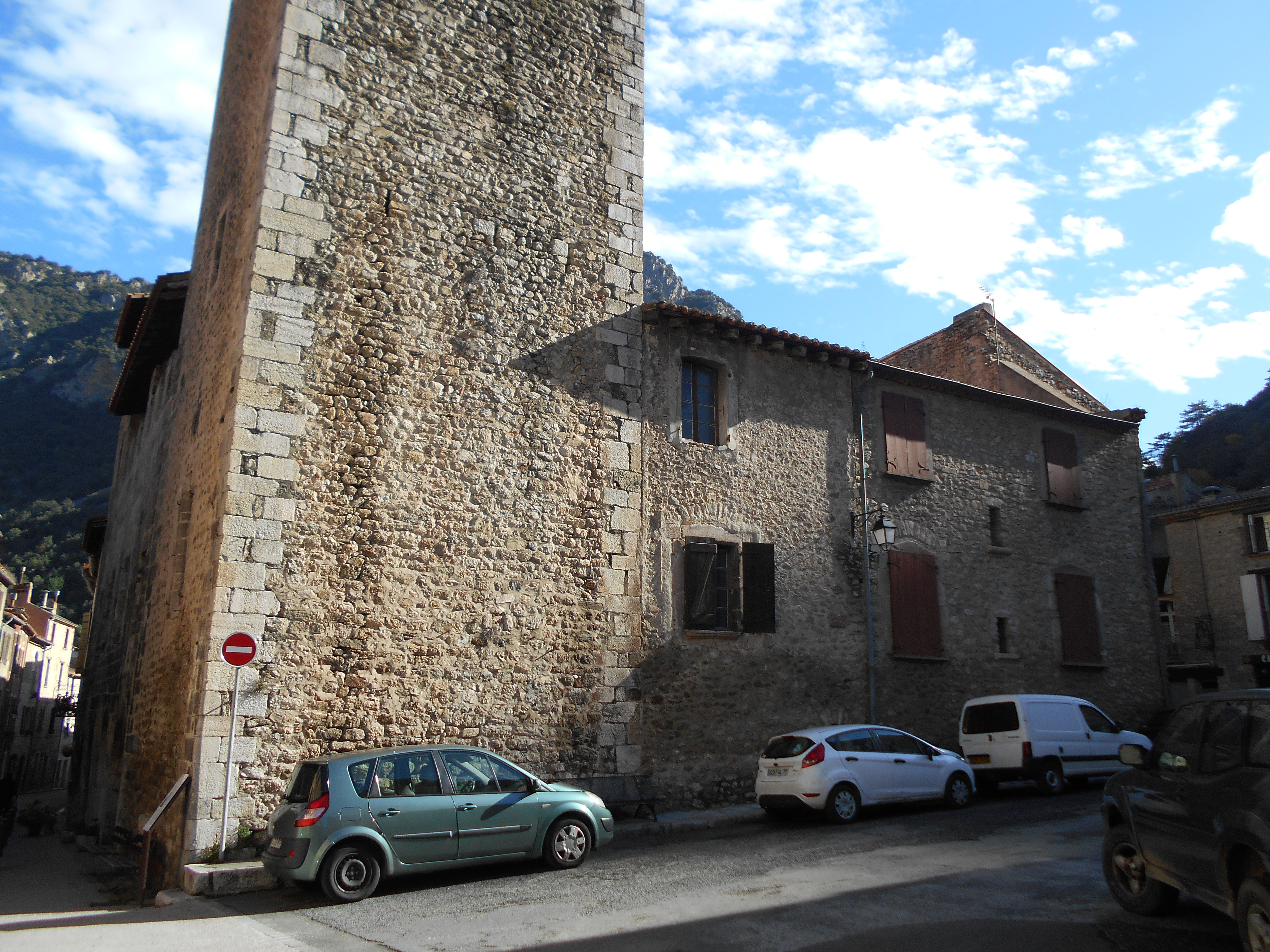 Façana de la Placeta de l'Antic Hospital de Vilafranca de Conflent